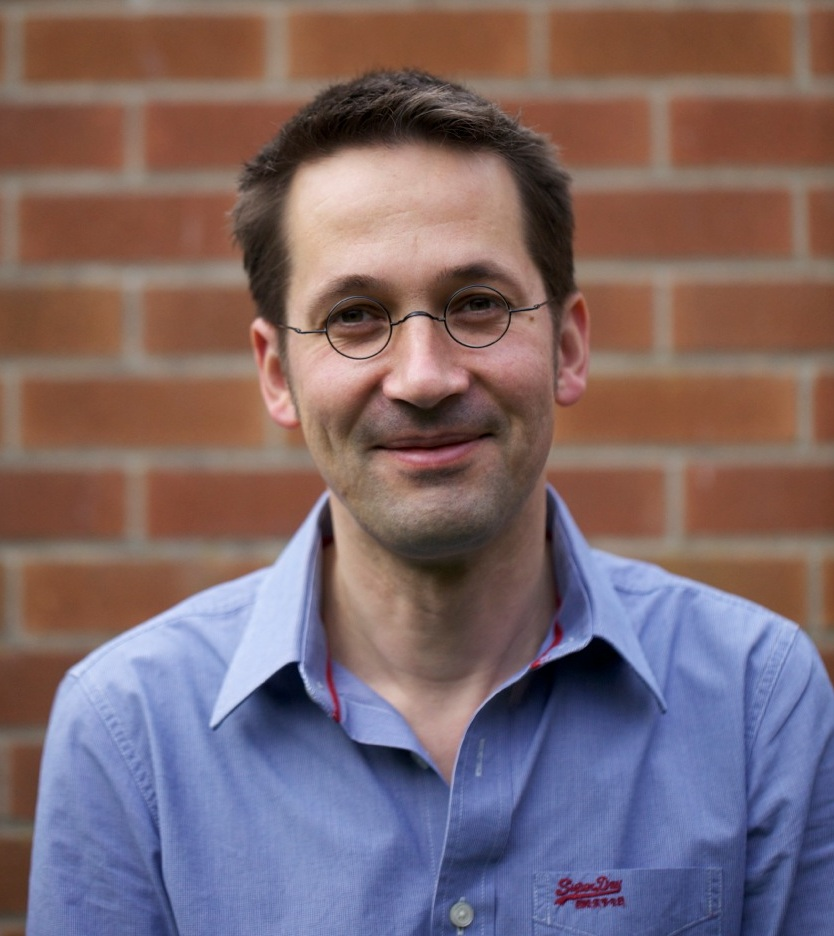 Foto von Wilhelm Winter